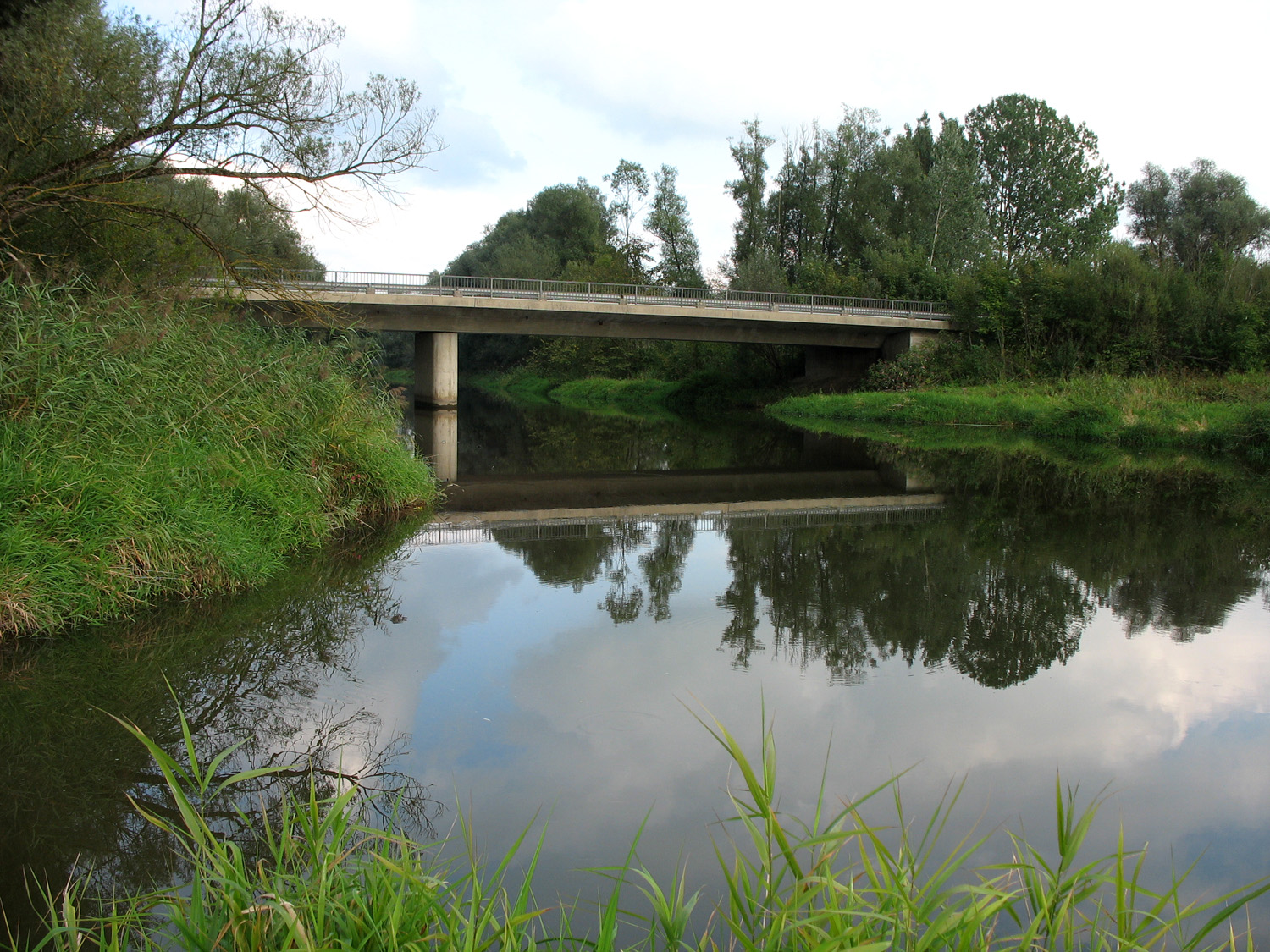 Mündung der Ebrach (von links kommend) in die Attel (von rechts kommend) bei Elend (Ortsteil von Wasserburg am Inn, Landkreis Rosenheim, Bayern, Deutschland). Brücke der Bundesstraße 15 über die Attel.